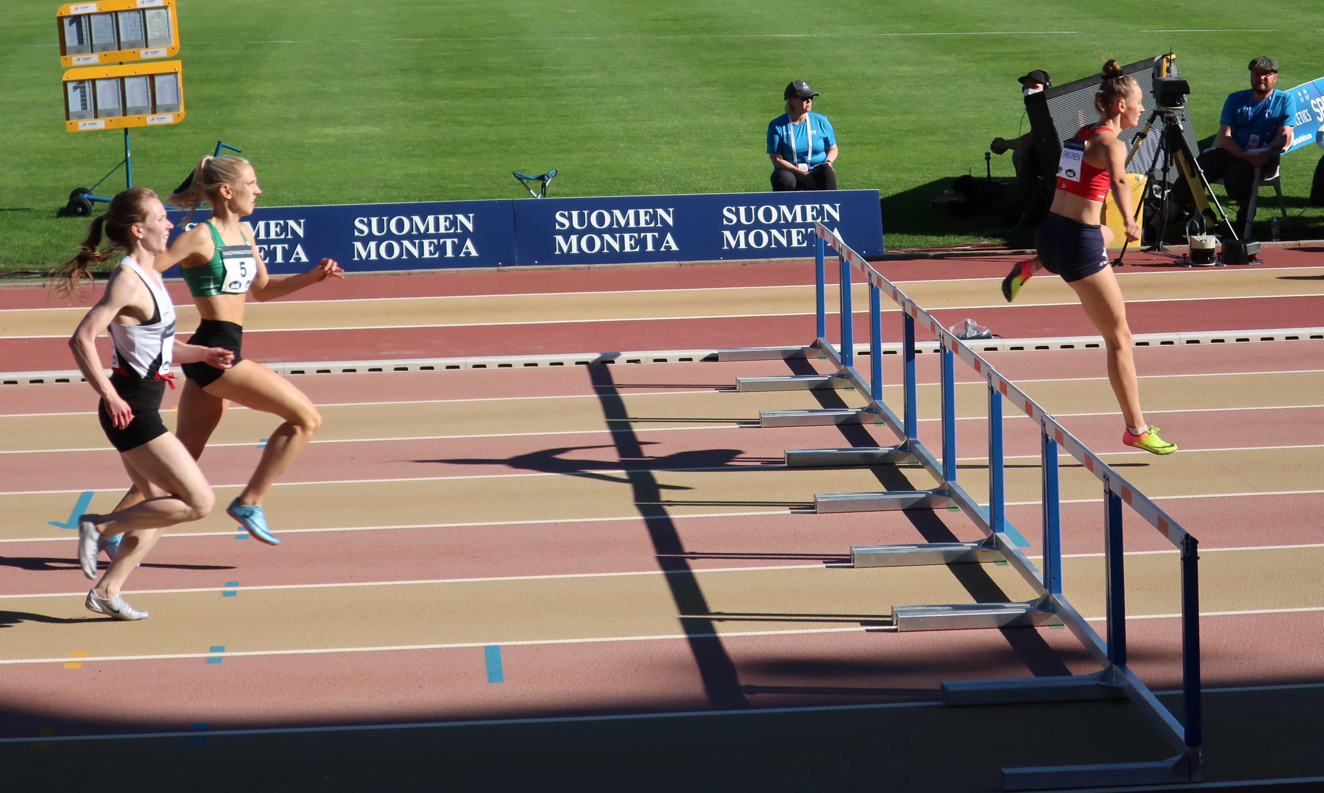 Naisten 400 metrin aitajuoksun loppusuoraa Kalevan kisoissa 2020. Kultamitalisti Viivi Lehikoinen johtaa selvästi ennen pronssimitalisti Aada Ahoa (numero 5) ja hopeamitalisti Martta Rautalaa.